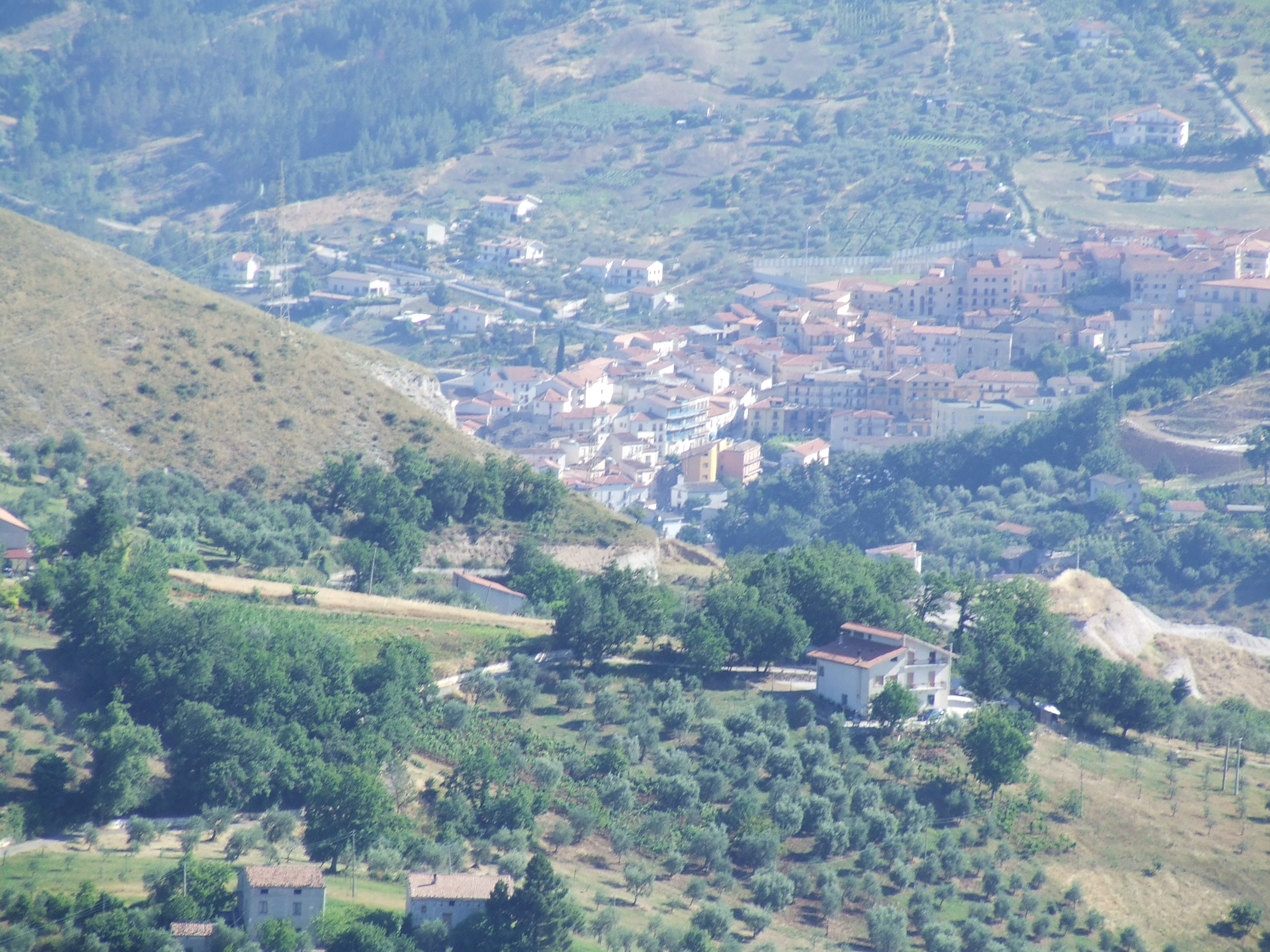 Vietri di Potenza visto da Caggiano